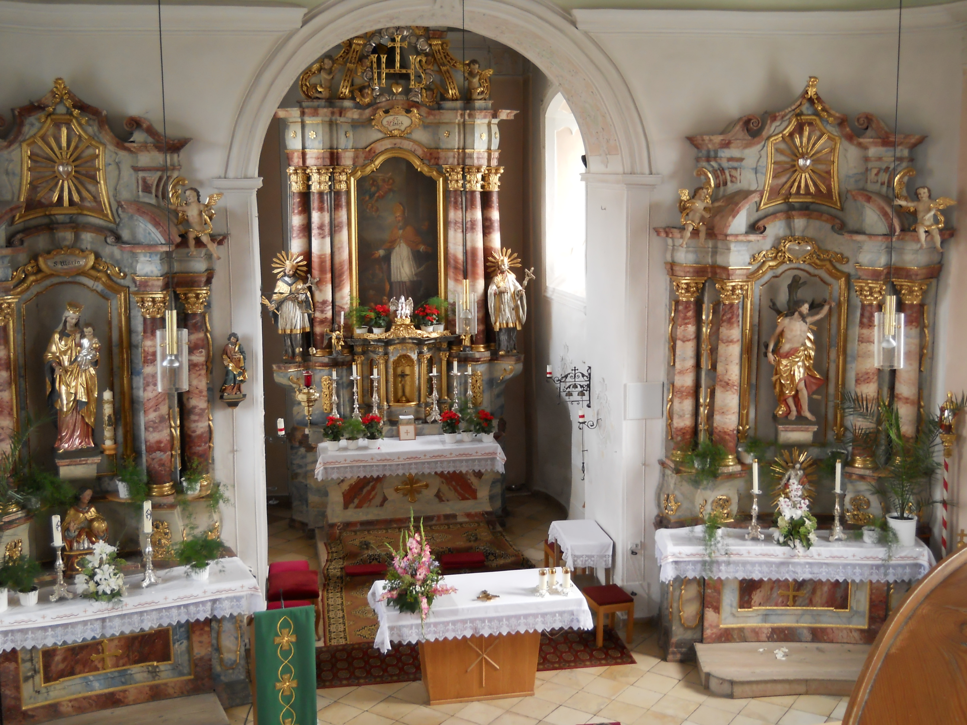 Die Barockaltäre der Pfarrkirche St. Ulrich in Kevenhüll, Gemeindeteil von Beilngries im oberbayerischen Landkreis Eichstätt